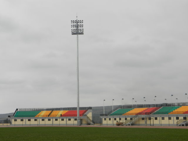 football